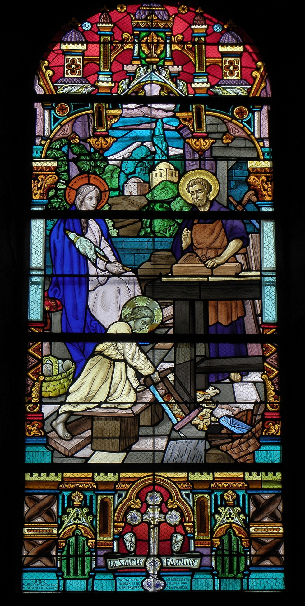 Église Notre-Dame de Rimou (35). Intérieur. Vitrail. Sainte-Famille de Nazareth.